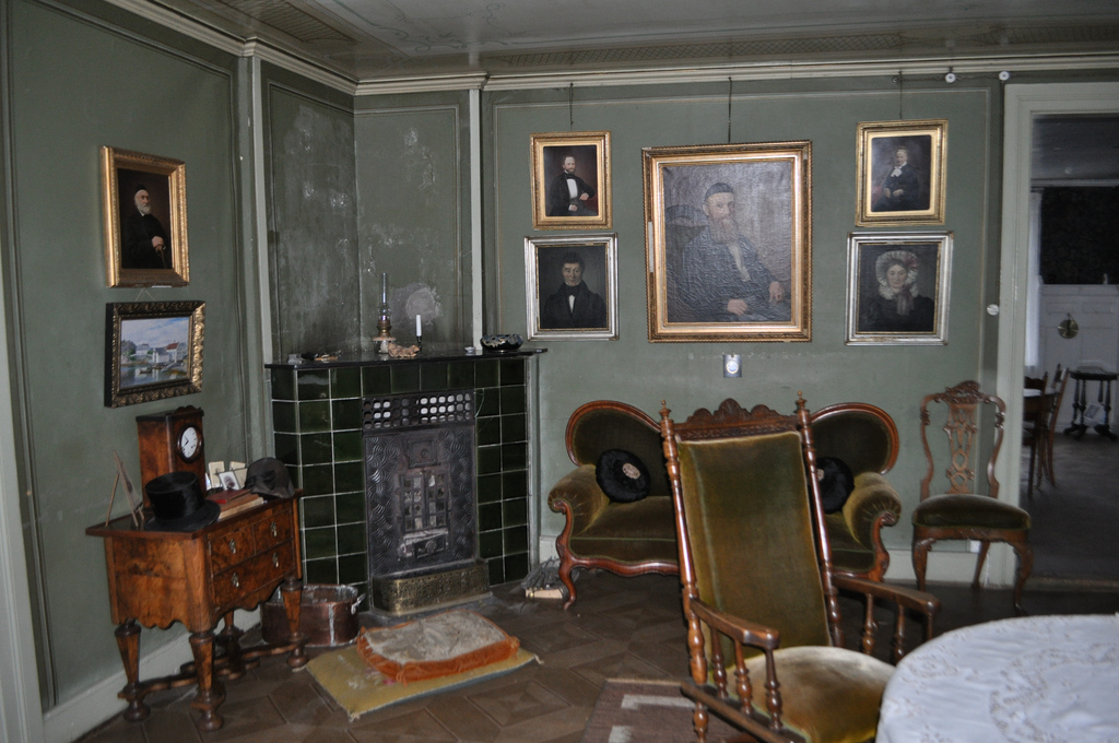 PÅ den gamle handelsplassen har væreierne regjert imperiet sitt i Nordnorge. Tiden har blitt stående i familiens hus.